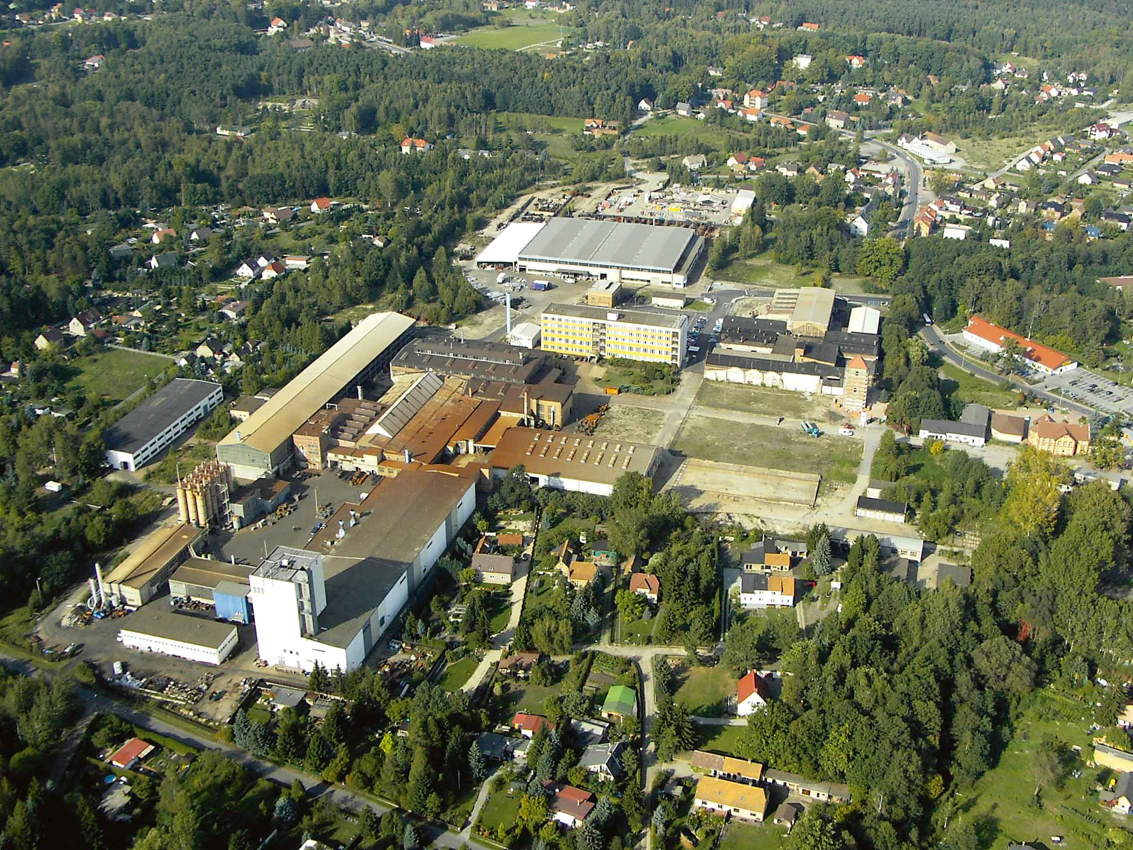 Keulahütte GmbH, Krauschwitz - Luftbild